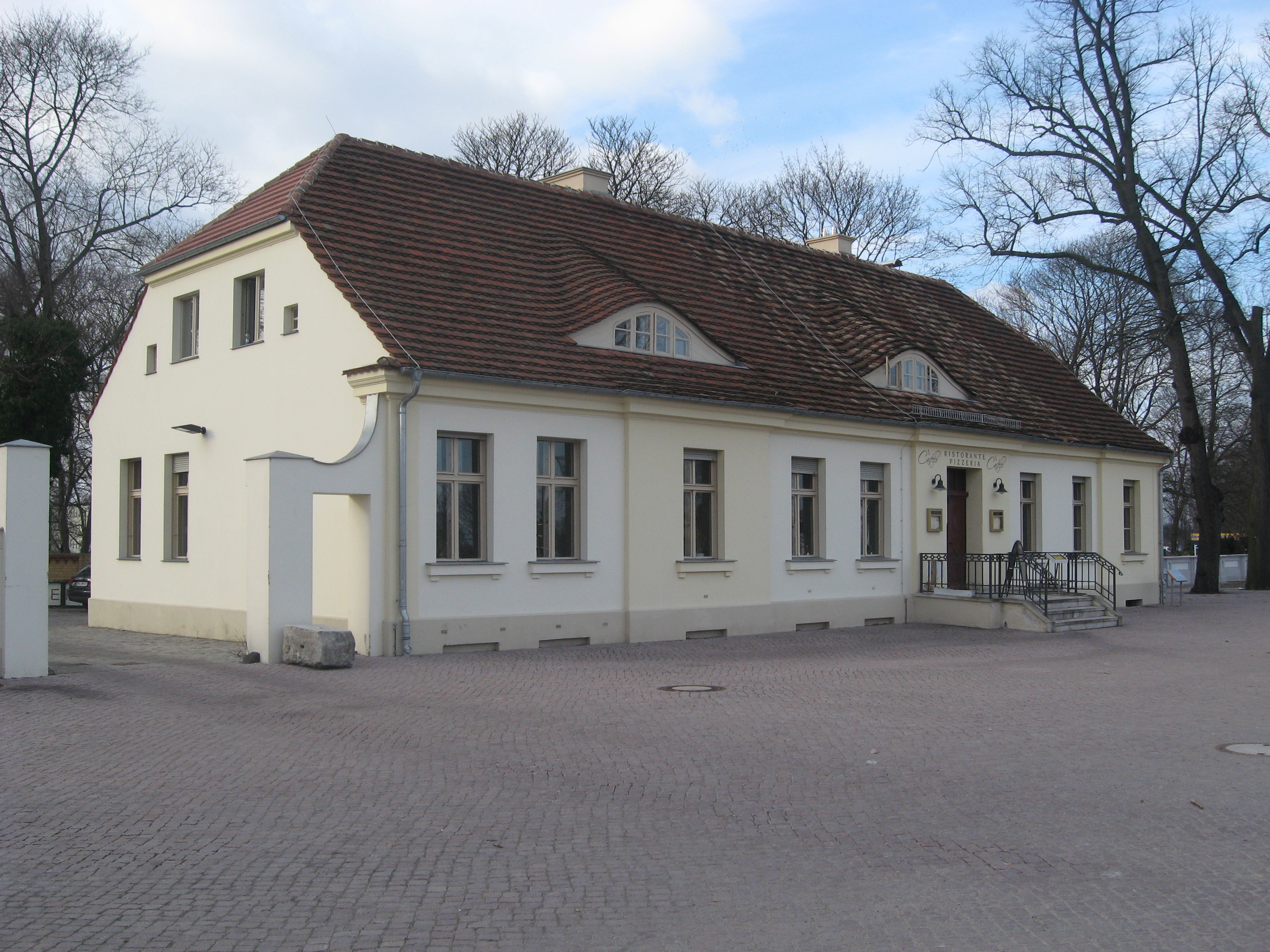 Ansicht von Süden